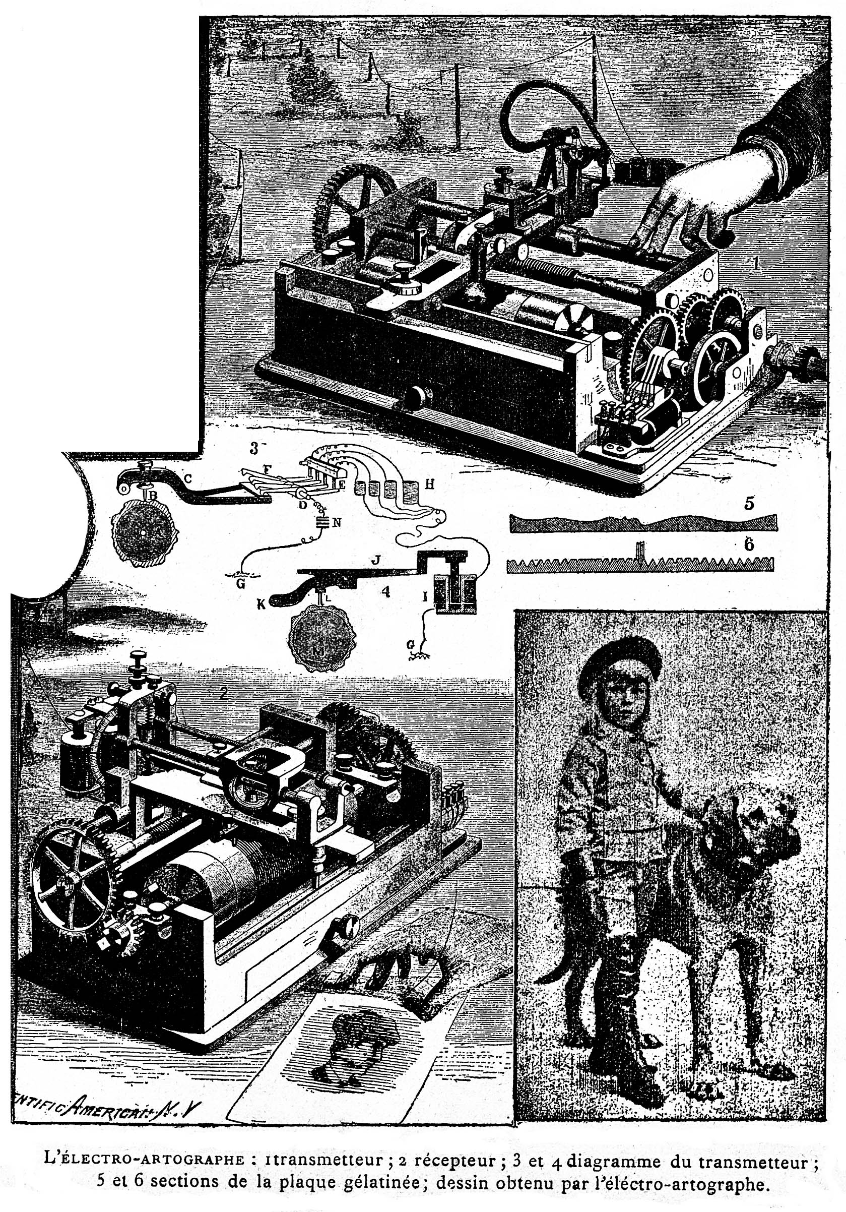 Électro-artographe, extrait du Supplément illustré des Annales, 1895. Il s’agit d’illustrations de l’electro-autograph (ou electro-artgraph) breveté par l’Américain Noah S. Amstutz (1864-1957) qui permet de transmettre par voie télégraphique une image photographique tirée sur gélatine (dont l’épaisseur varie selon l’intensité des noirs). À la réception, l’image est gravée sur cire et peut fournir par galvanotypie un cliché imprimable.